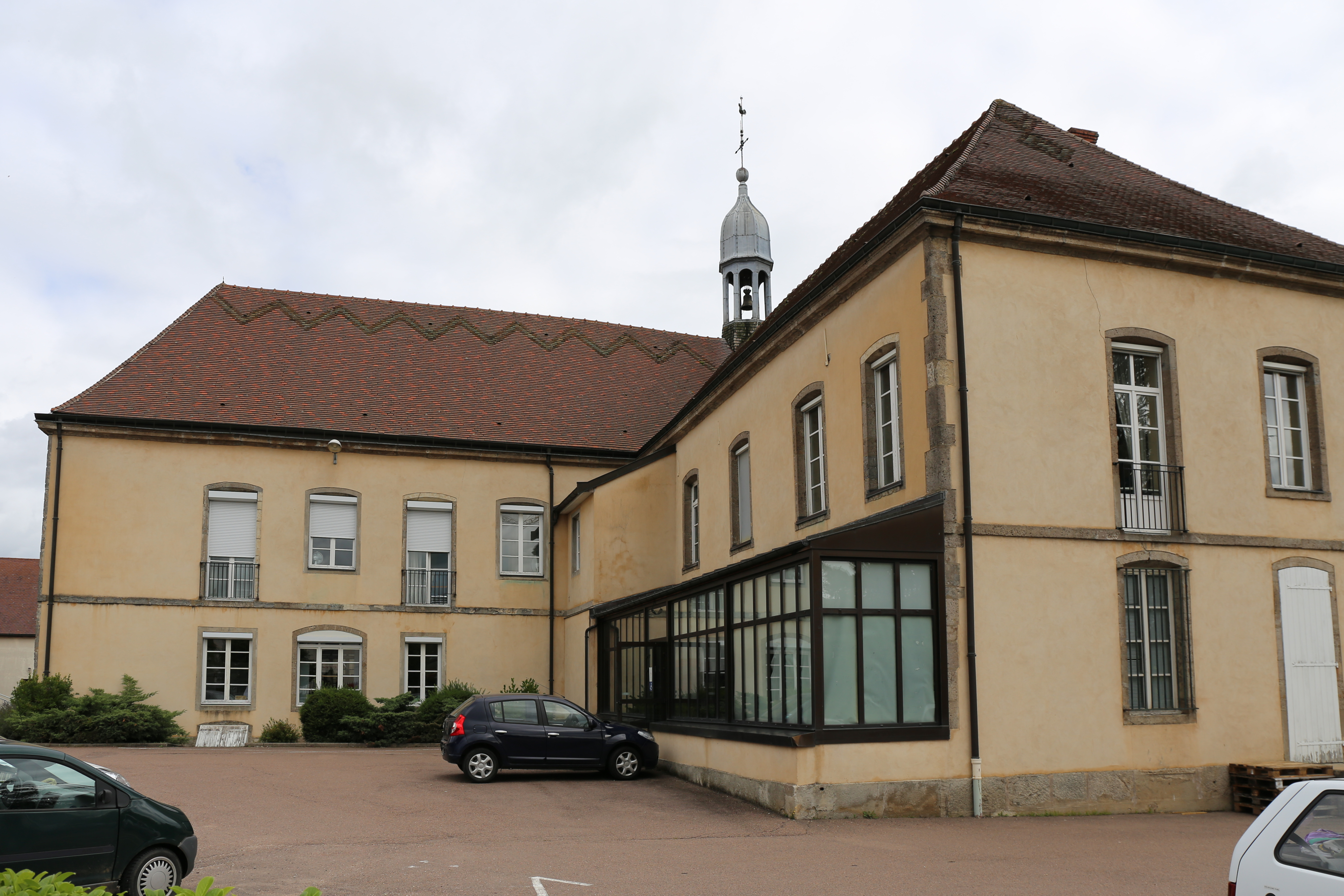 Hôpital de Saulieu, construit au 18e siècle.